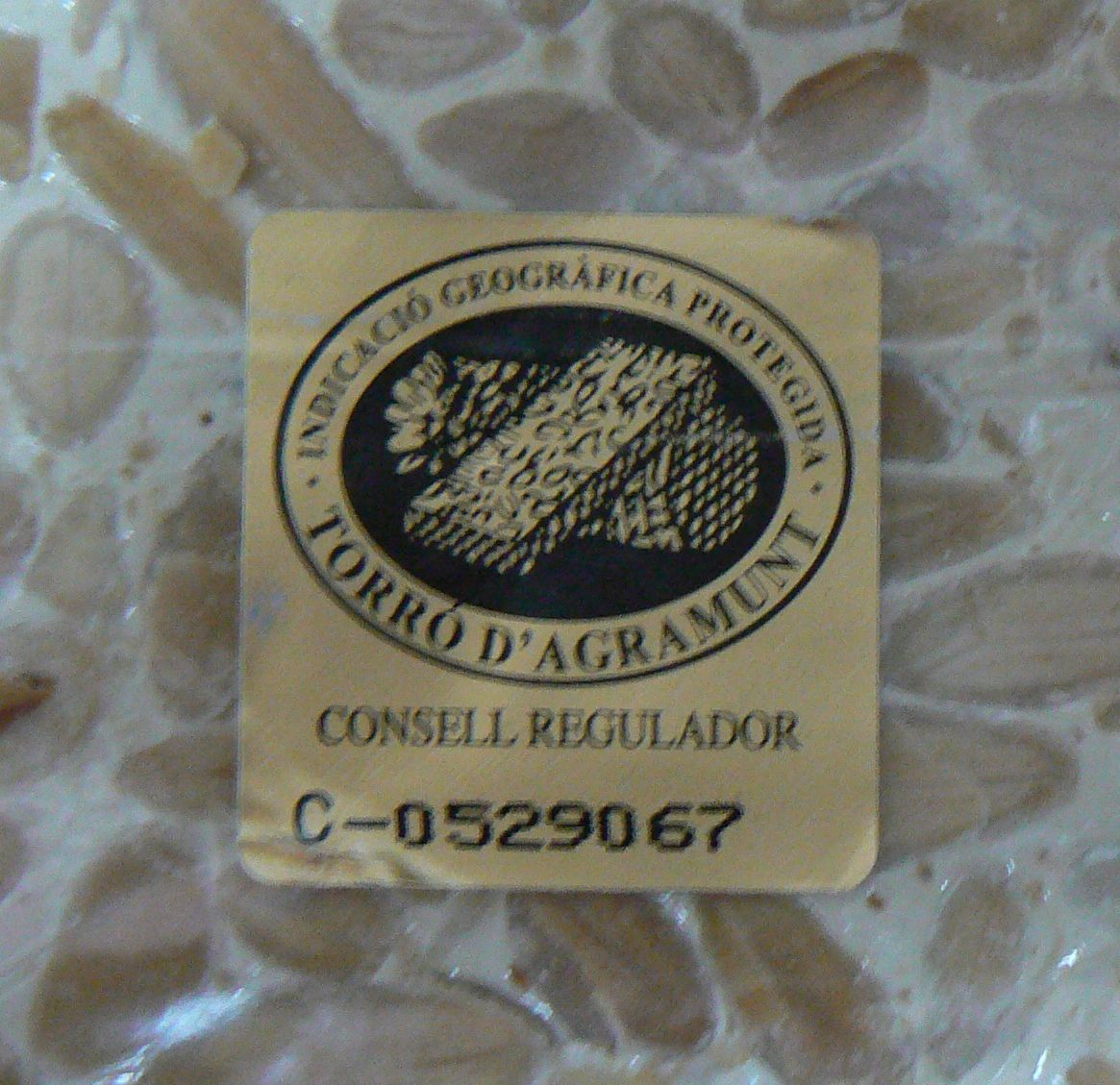 Etiqueta del Consell Regulador de la Indicació Deogràfica Protegida del Torró d'Agramunt.